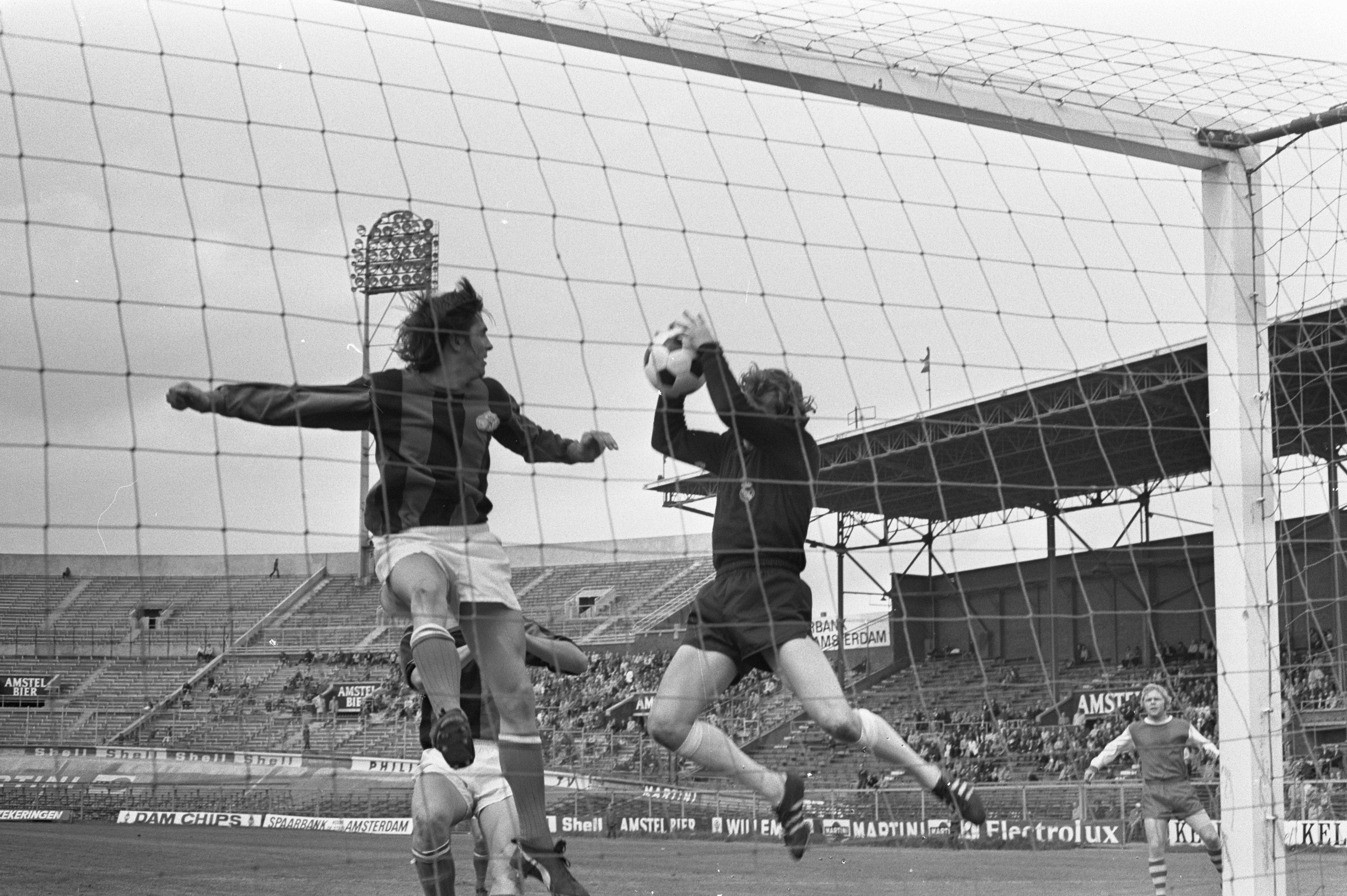 Match de football DWS - PSV (1-1). Gerrie Deijkers (à gauche, DWS) en duel aérien avec le gardien de but Jan van Beveren (PSV). Photographie par R.C. Croes / Anefo.